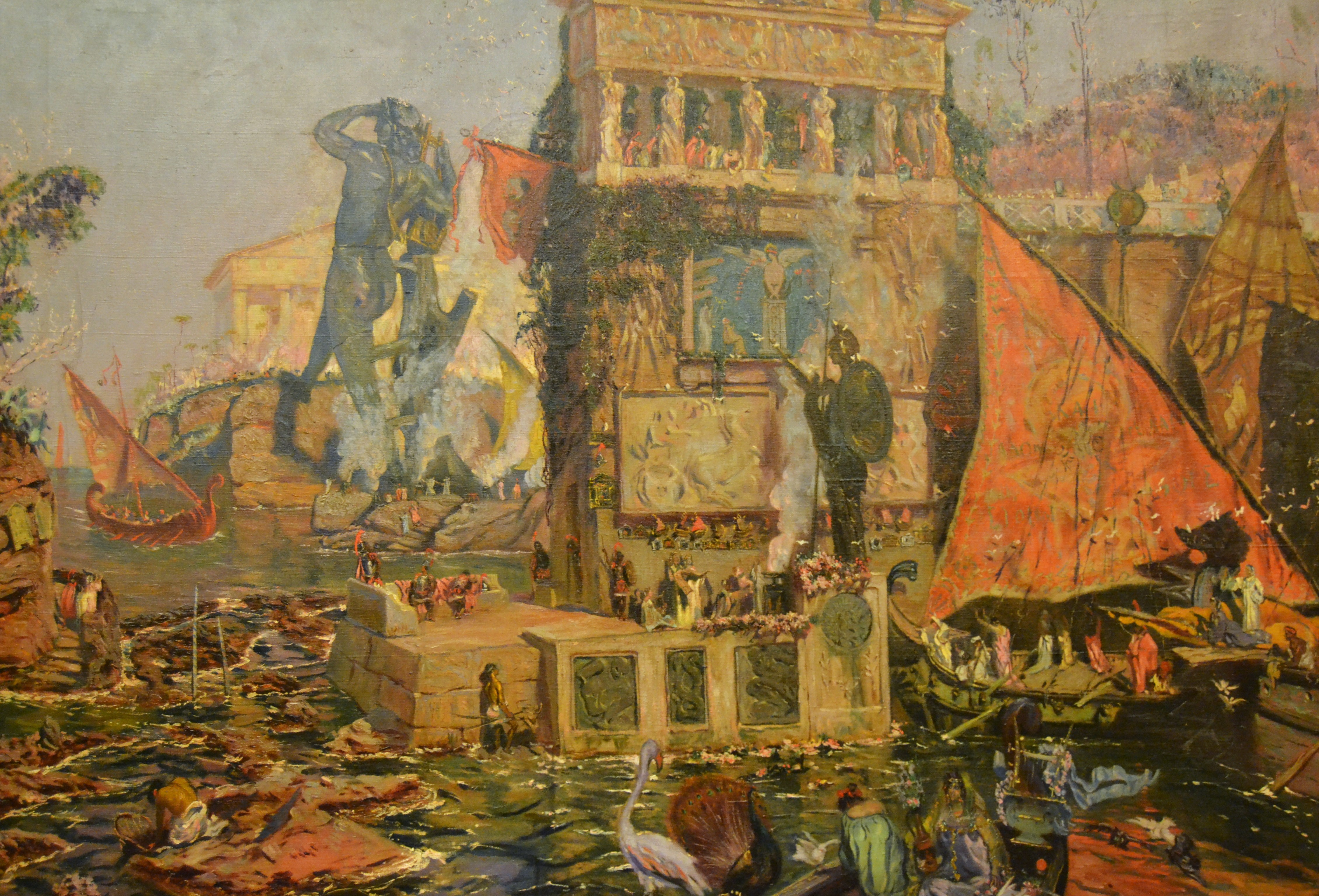 El lienzo, que fue pintado en 1914, muestra la ciudad de Rodas, su puerto y el célebre coloso de la ciudad, que era una de las Siete Maravillas del mundo antiguo.